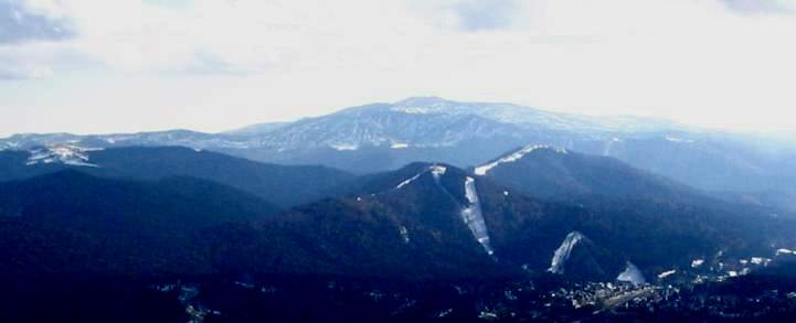 A Baj-hegység déli része, és jobbra, a Prahova völgyében Predeal.